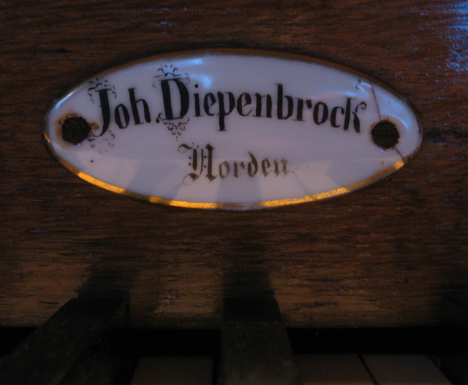 Firmenschild auf der Orgel von Johann Diepenbrock in Spiekeroog, heute Spetzerfehn, Ostfriesland, Niedersachsen, Deutschland